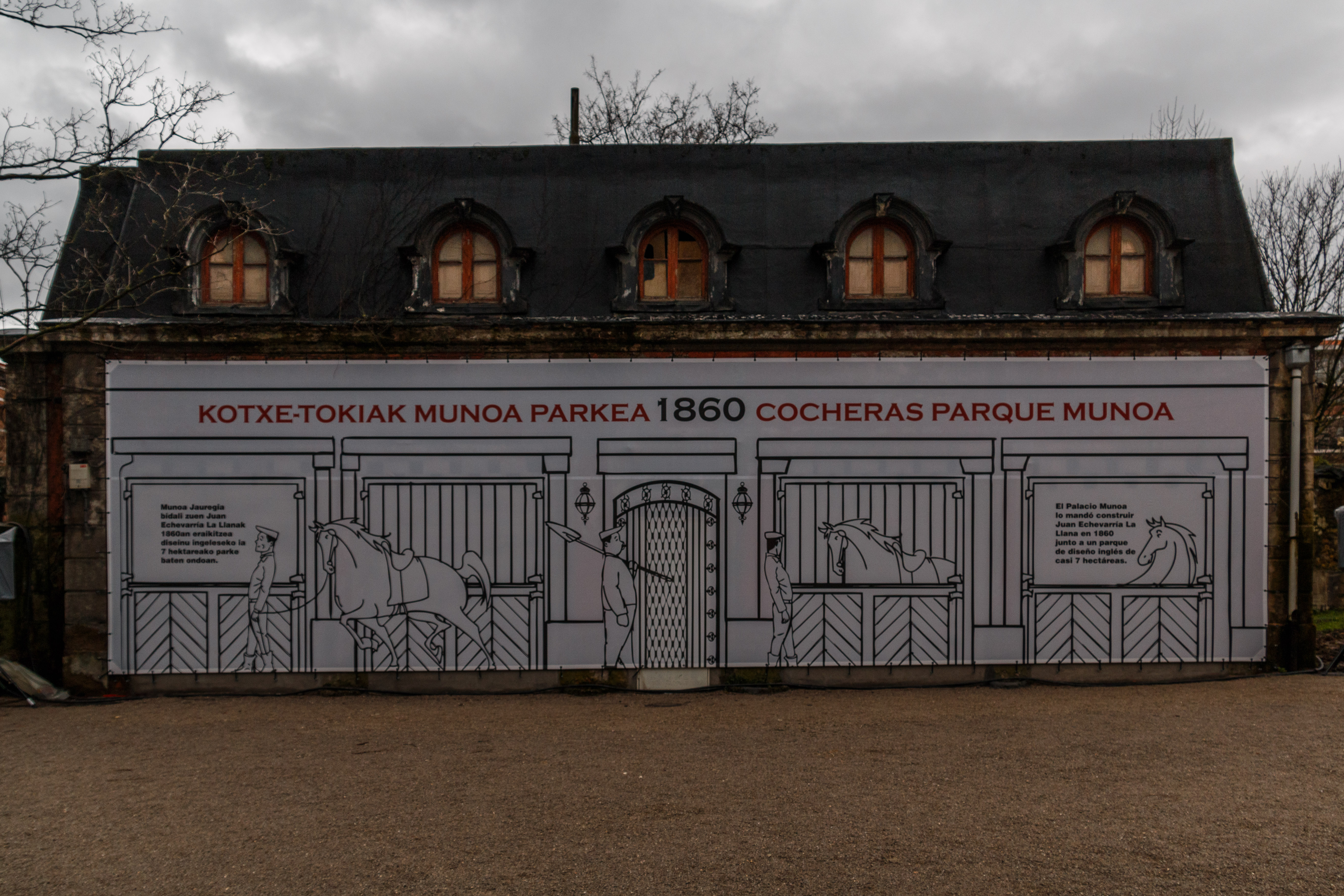 Munoa jauregia